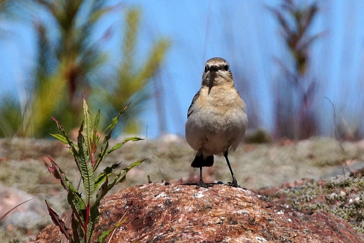 Kivitasku naaras Porvoo Sondby